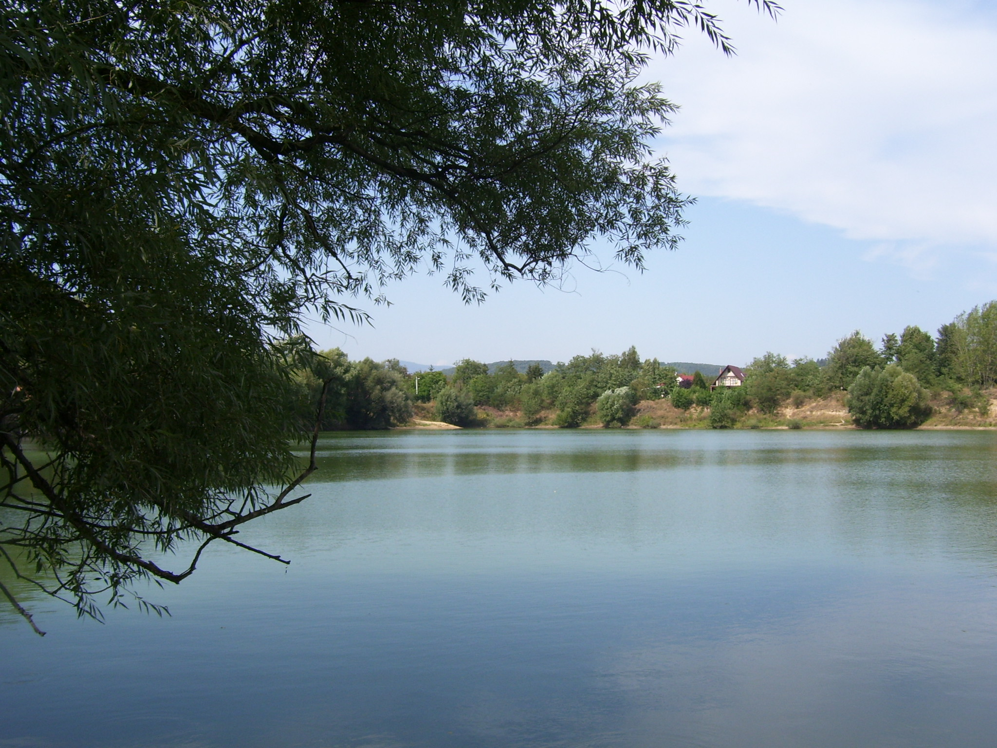 Kisoroszi, Cseres-tó (Pest megye)